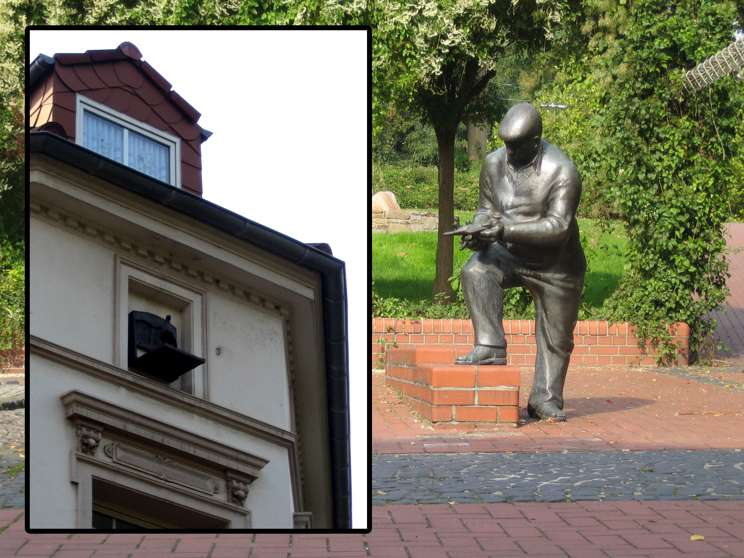 Taubenvatta Denkmal in Castrop-Rauxel Germany